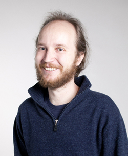 Miguel Serrano Larraz, escritor zaragozano